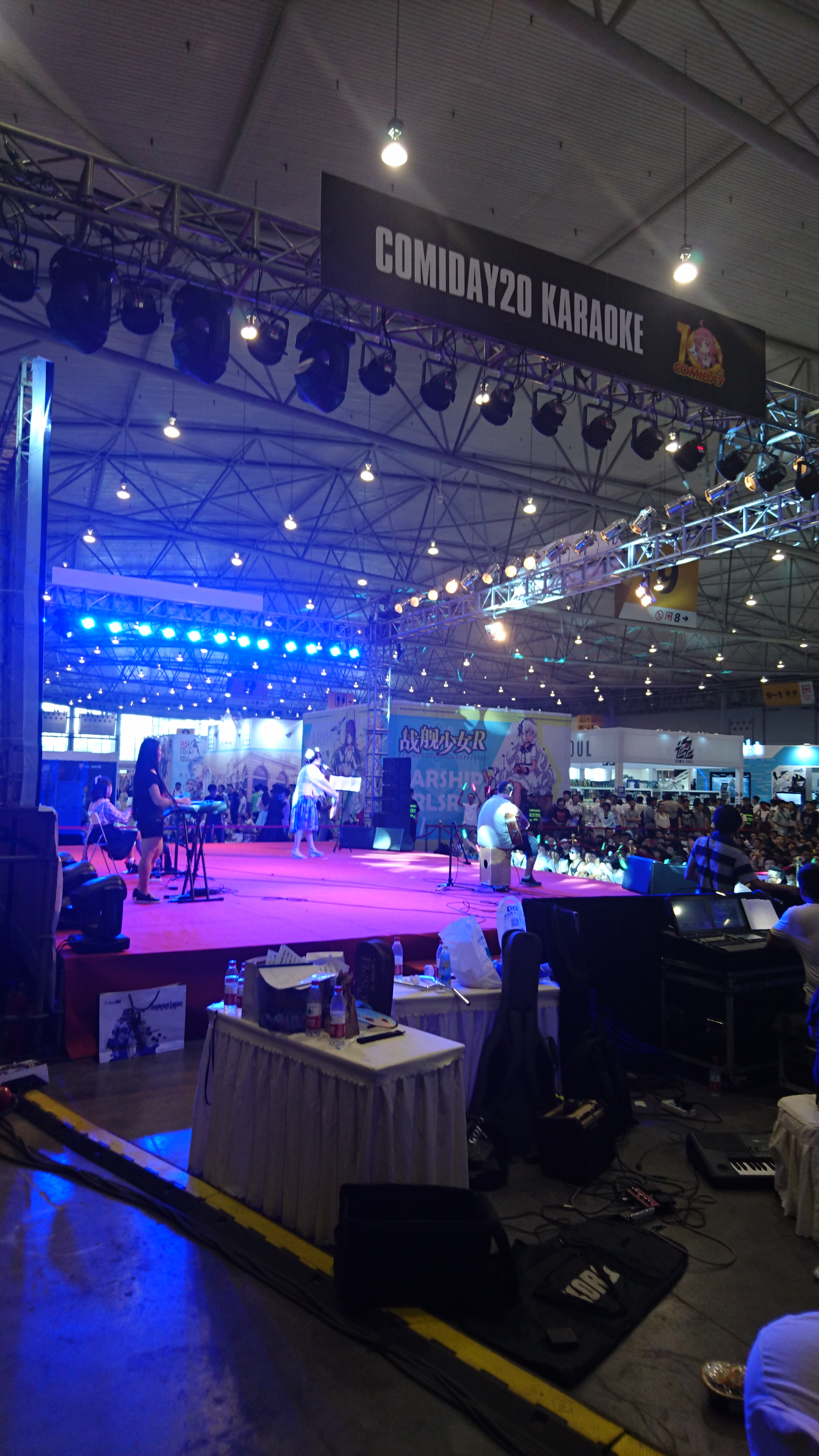 中文（中国大陆）: Comiday20卡拉OK大会